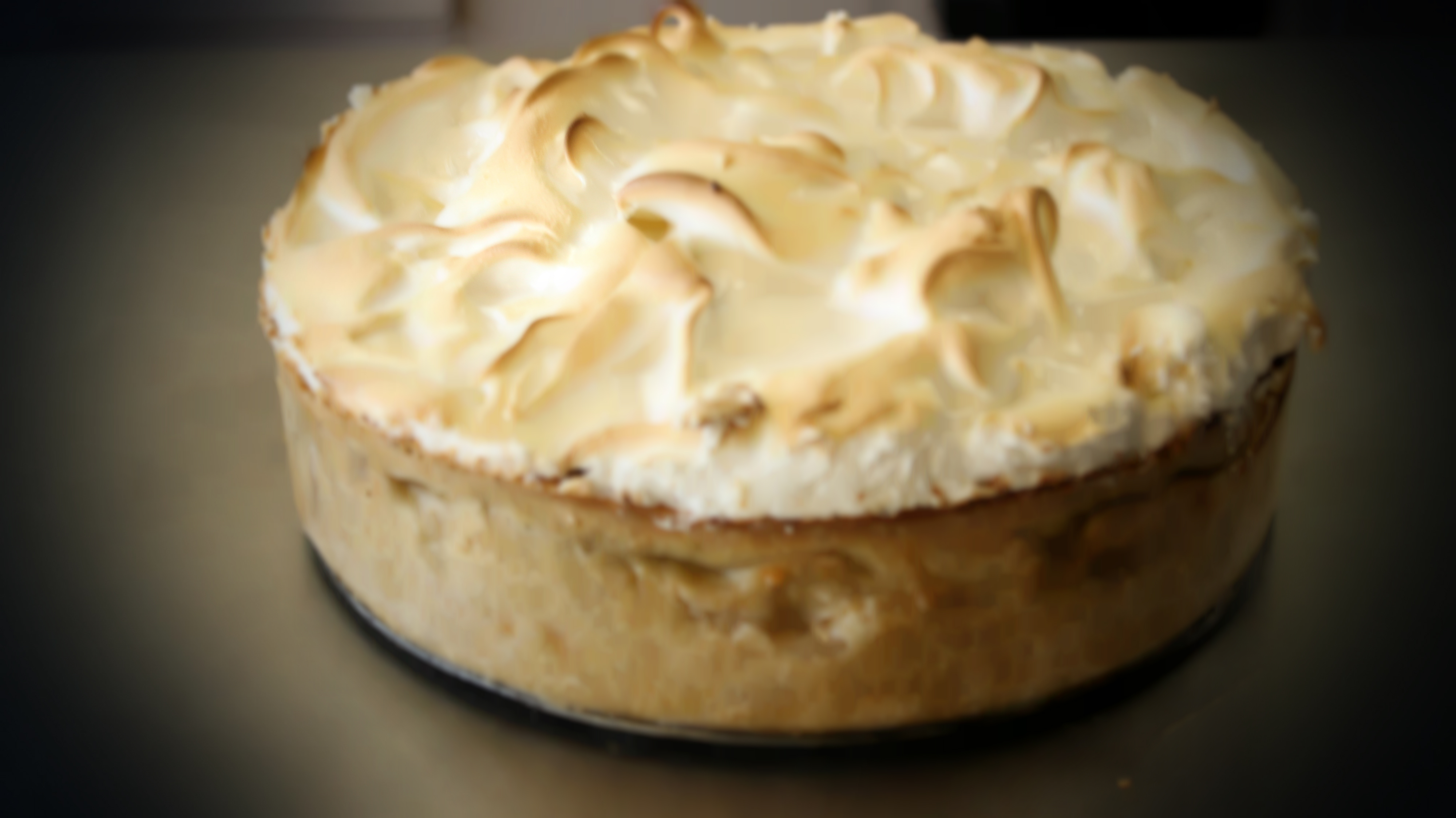 Pastel de novia Tucumano realizado por alumnos del CFI Dock sud. Receta tradicional de Tucumán y el NOA. Obra del ingenio de la gente de campo en los tiempos en que no existían las tortas de casamiento que hoy conocemos. Plato agridulce, infaltable en las fiestas de casamiento tucumanas , el pastel de novia forma parte de la tradición culinaria de esta provincia. También se consigue en la Feria tradicional que se realiza todos los Sábados en Simoca